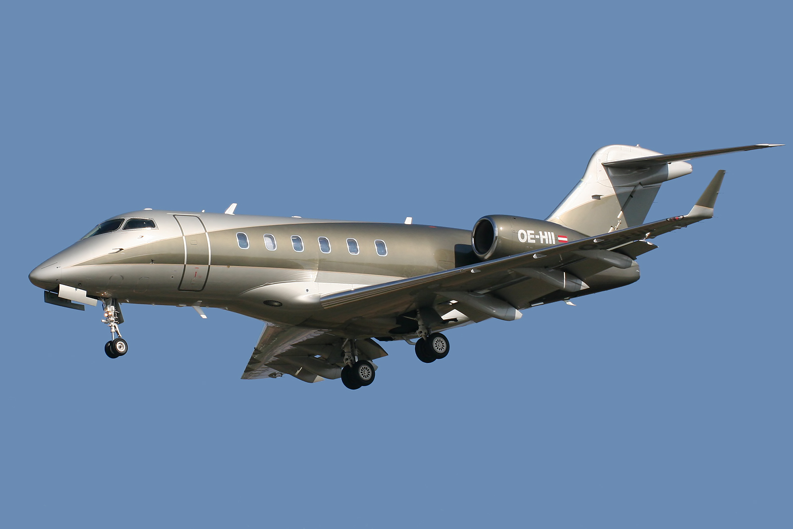 Barcelona El Prat (LEBL/BCN) Airport